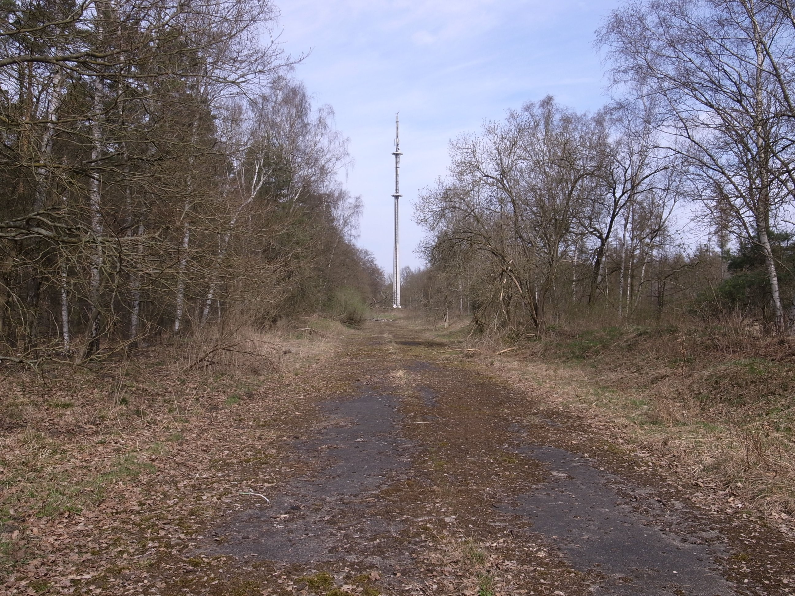 Rennstrecke Dessau, ehemalige Verbindungsstraße zwischen Dessau und Wolfen die nach den Bau der neuen Straße und Brücke über die Autobahn stillgelegt wurde Die ehemalige Landstraße wurde einige Jahre als Teil der Rennstrecke genutzt. Ansicht in Fahrtrichtung zur „Kurve der Jugend“.